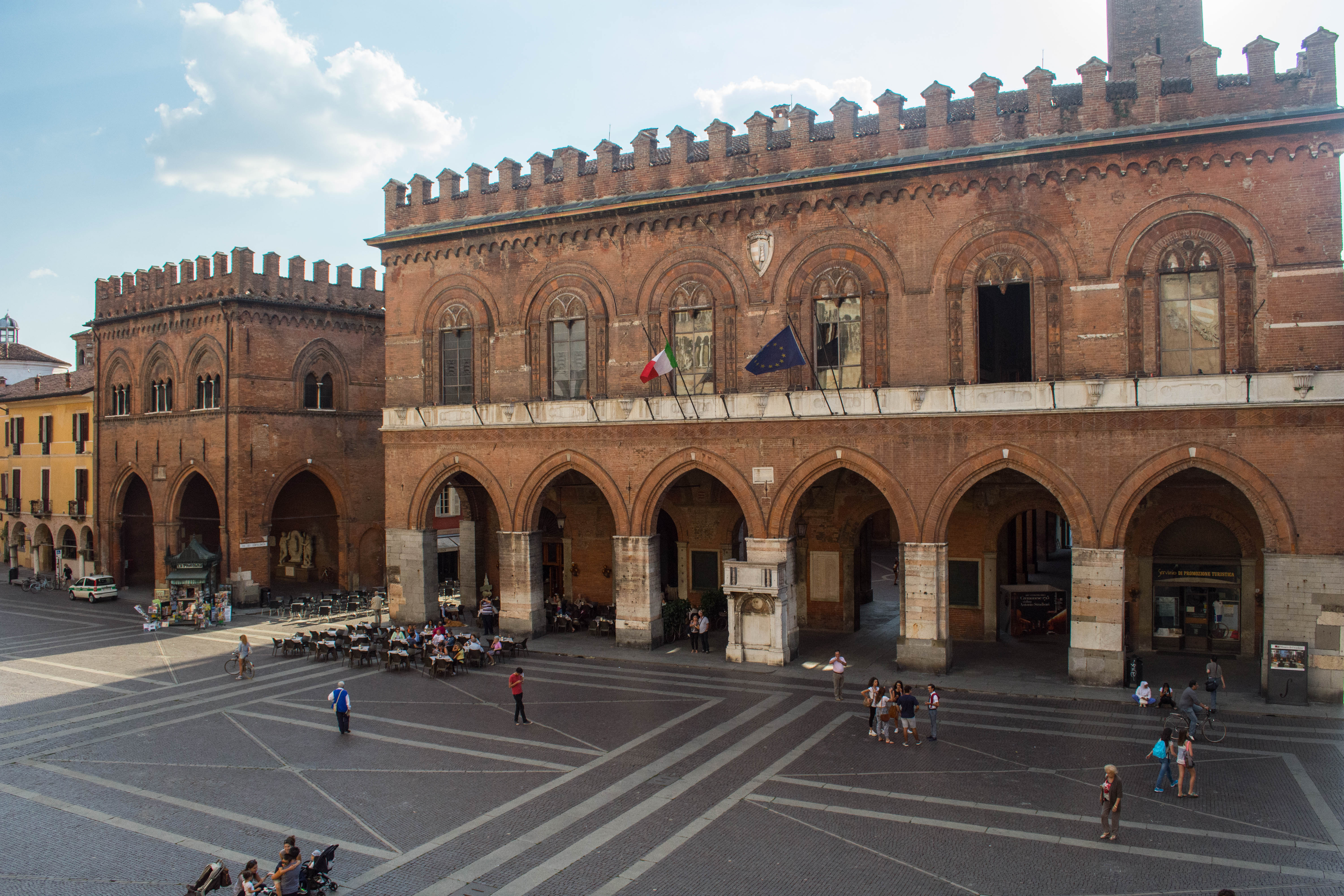 Palazzo Comunale This is a photo of a monument which is part of cultural heritage of Italy.